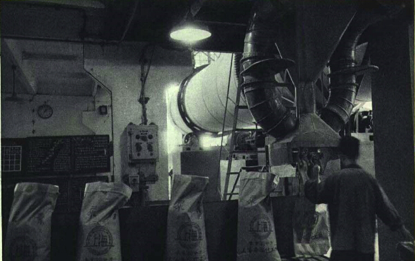 1965年吴泾化工厂尿素厂